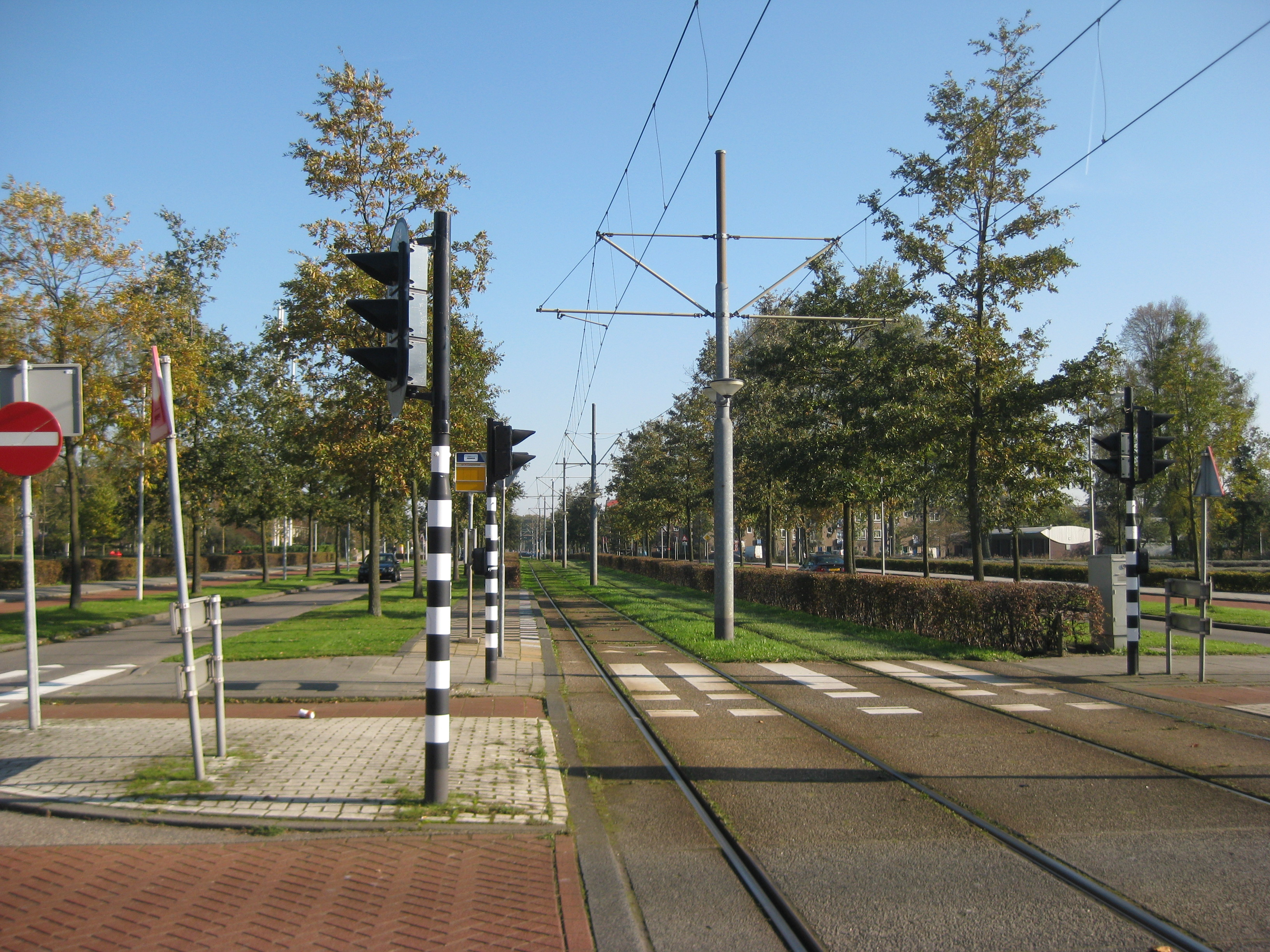 Burgemeester Röellstraat bij de Dr. H. Colijnstraat in Geuzenveld, Amsterdam Nieuw-West.